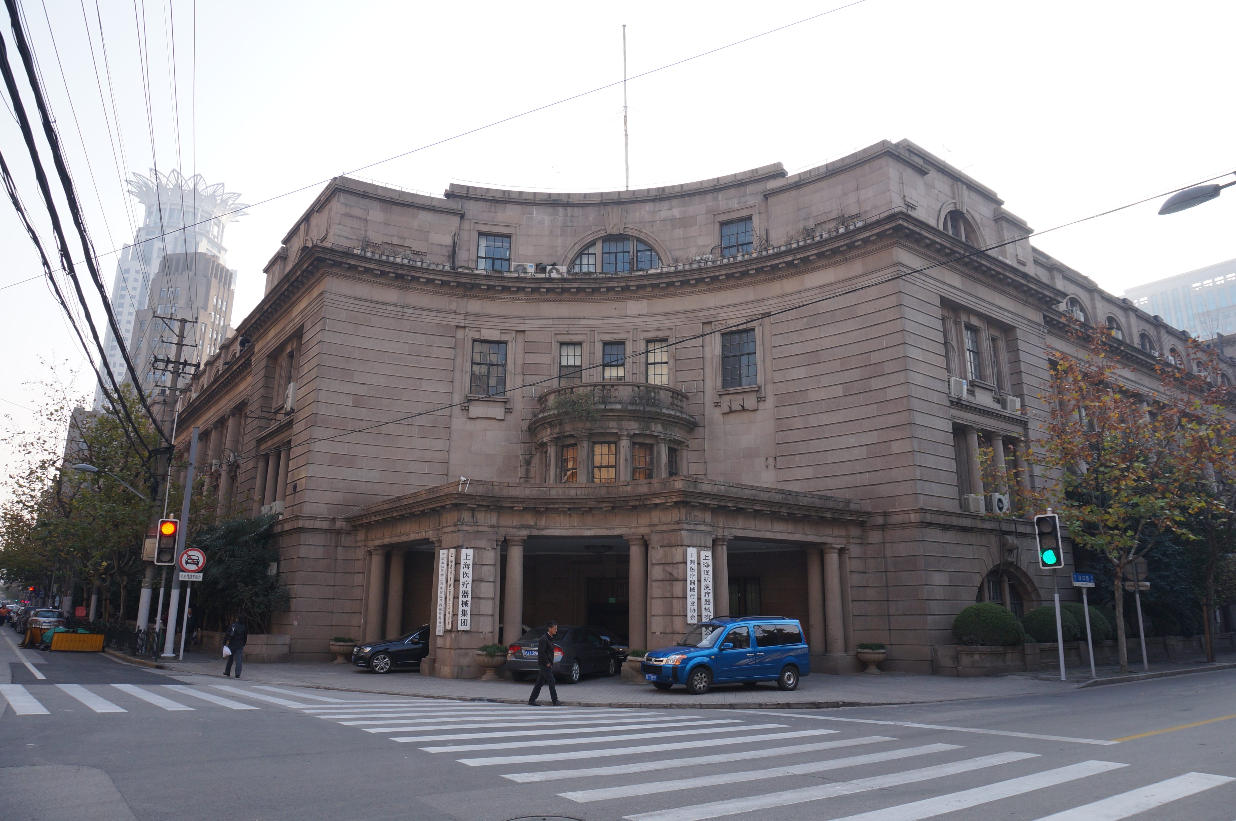 上海工部局大楼